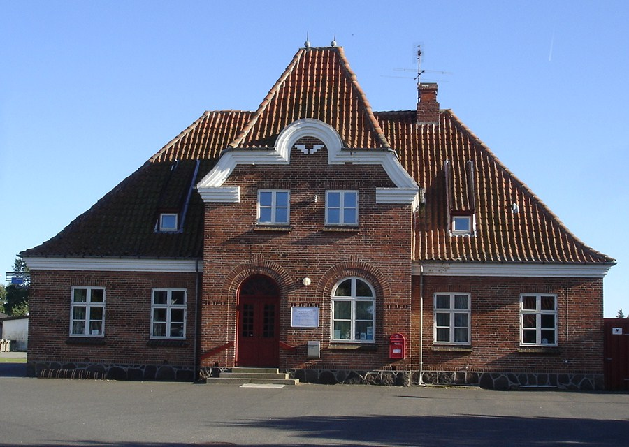 Bagenkop Station fra vejside